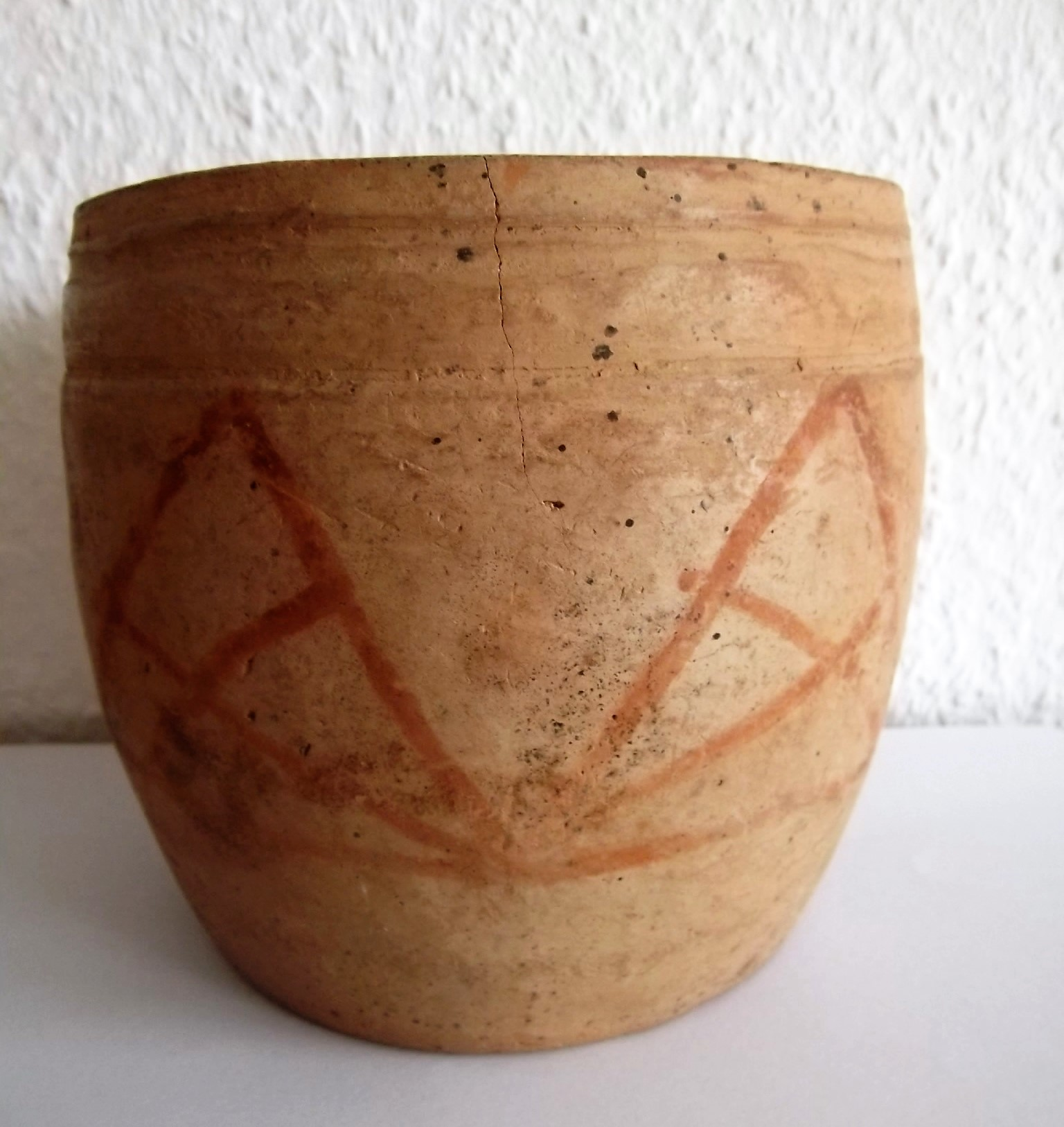 Hethitisches Tongefäß (vor 1200 v. Chr.)